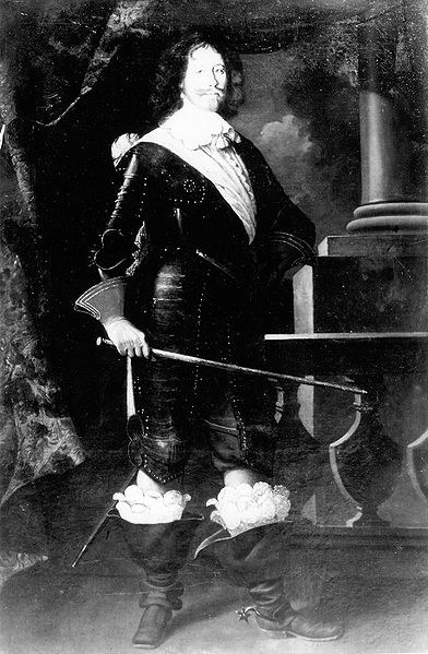 Jean-Armand du Peyrer, le comte de Tréville. Portrait du comte de Tréville par Le Nain. Ce portrait orna longtemps le salon du château de Trois-Villes près de Tardets. Il fut vendu vers 1954 à Paris et sa trace s'est perdue depuis.